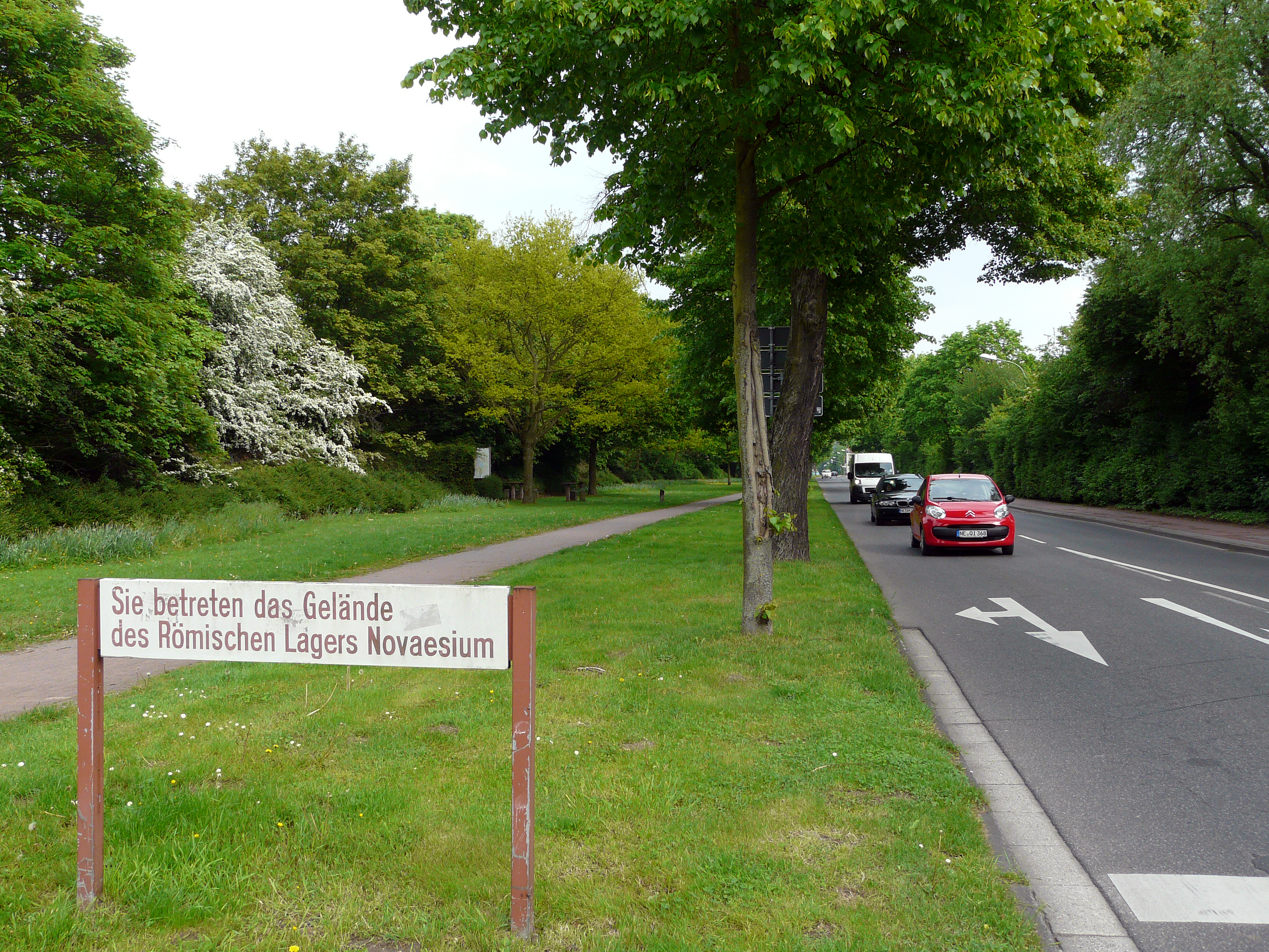 Markierung des ehemaligen römischen Militärlagers von Novaesium; Historischer Rundgang, Neuss